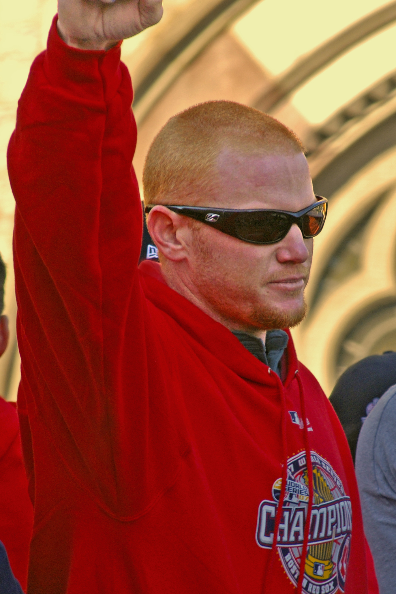 Bobby Kielty